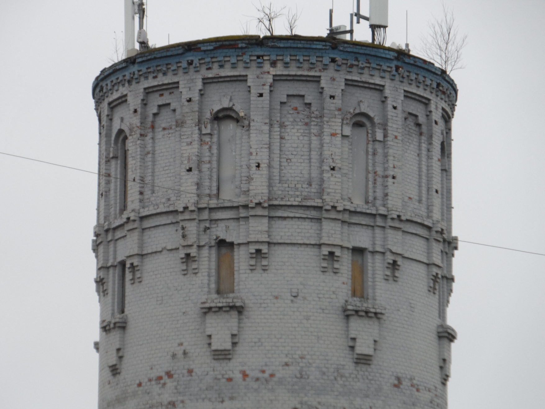 Объект культурного наследия Москвы